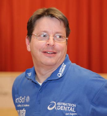 Marc Lang beim Weltrekord im Blindsimultan 2011 in Sontheim